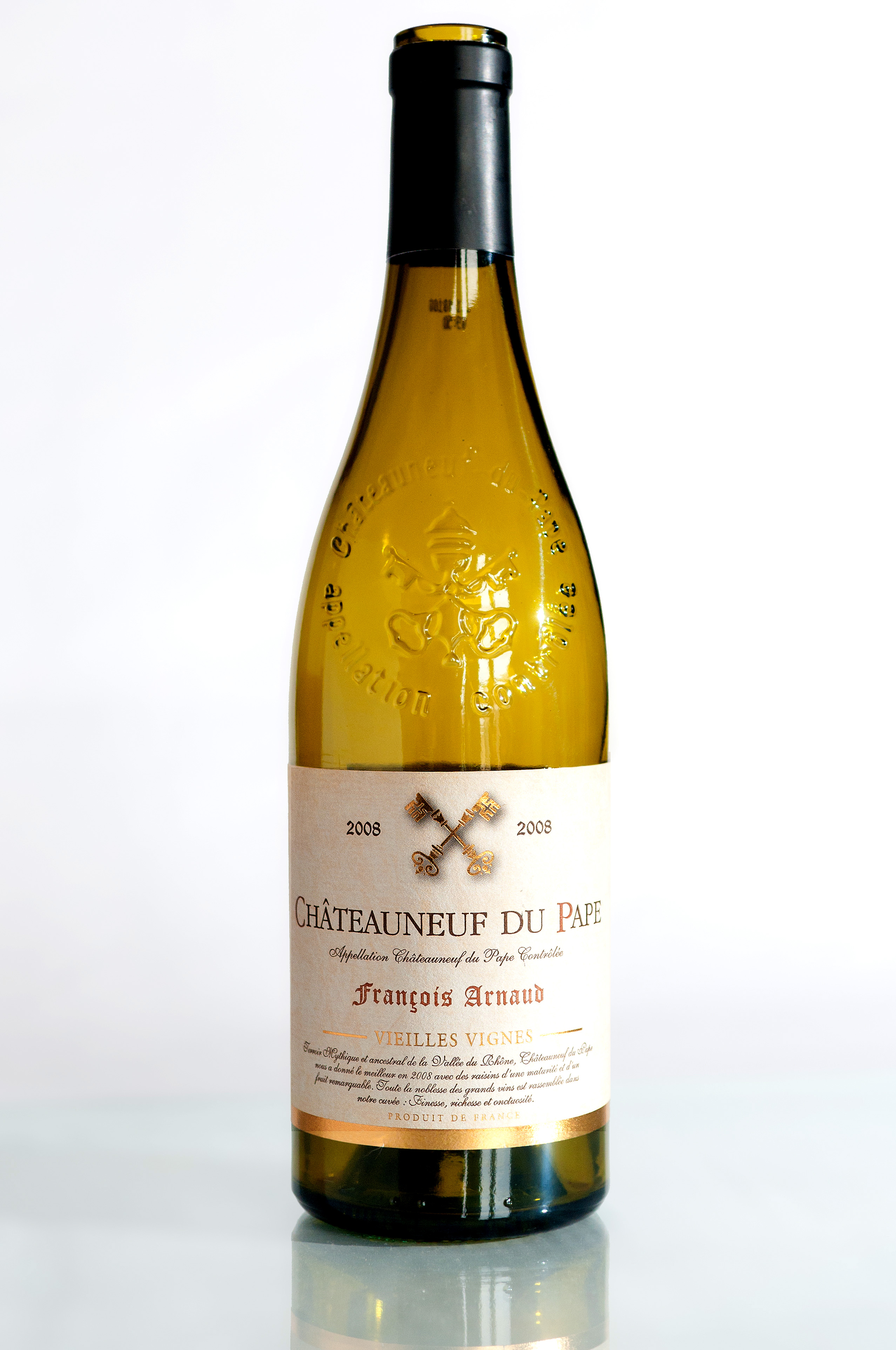 Châteauneuf-du-pape blanc AOC François Arnaud millésime 2008